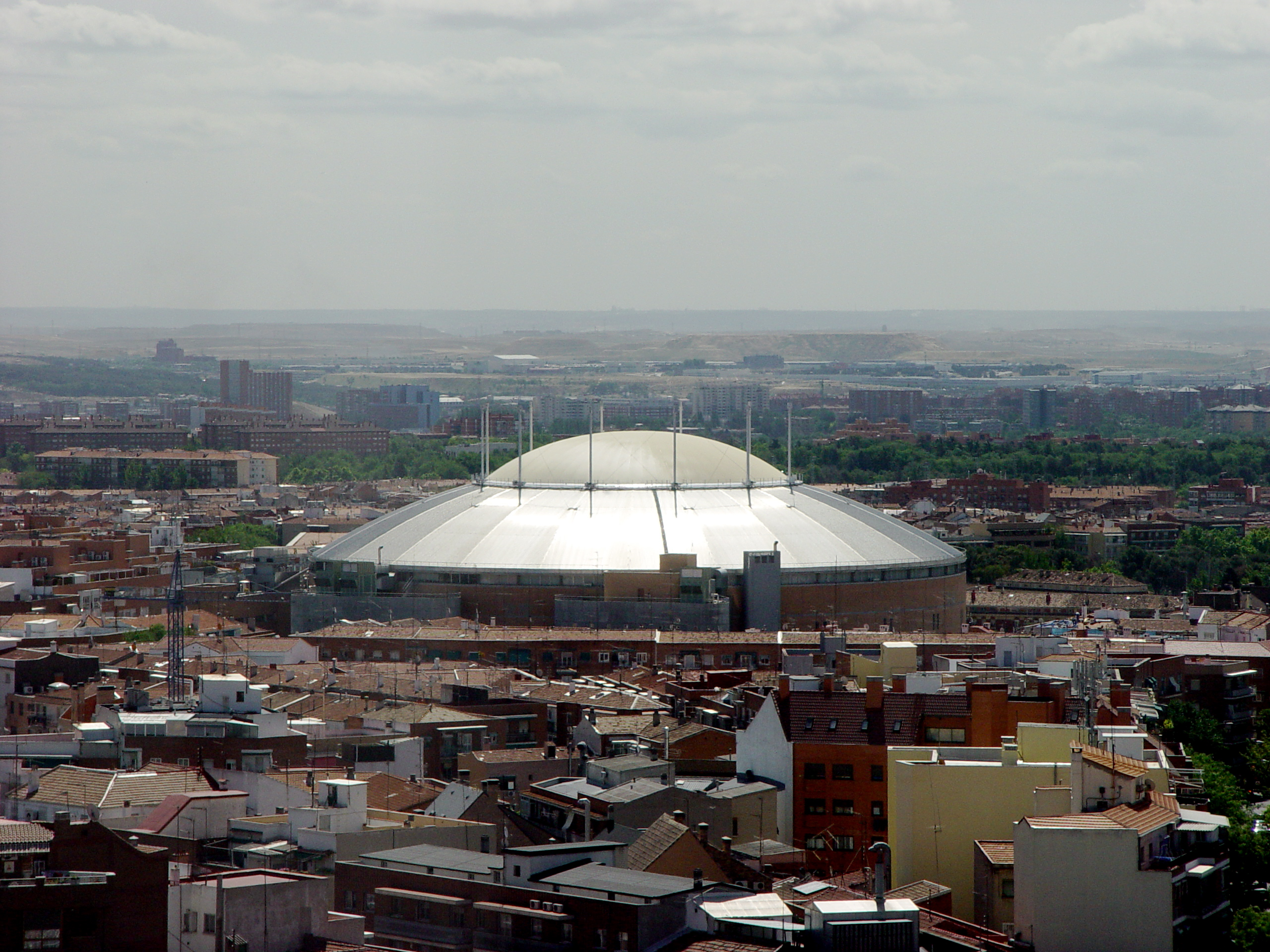 Palacio de Vistalegre, Madrid, España.